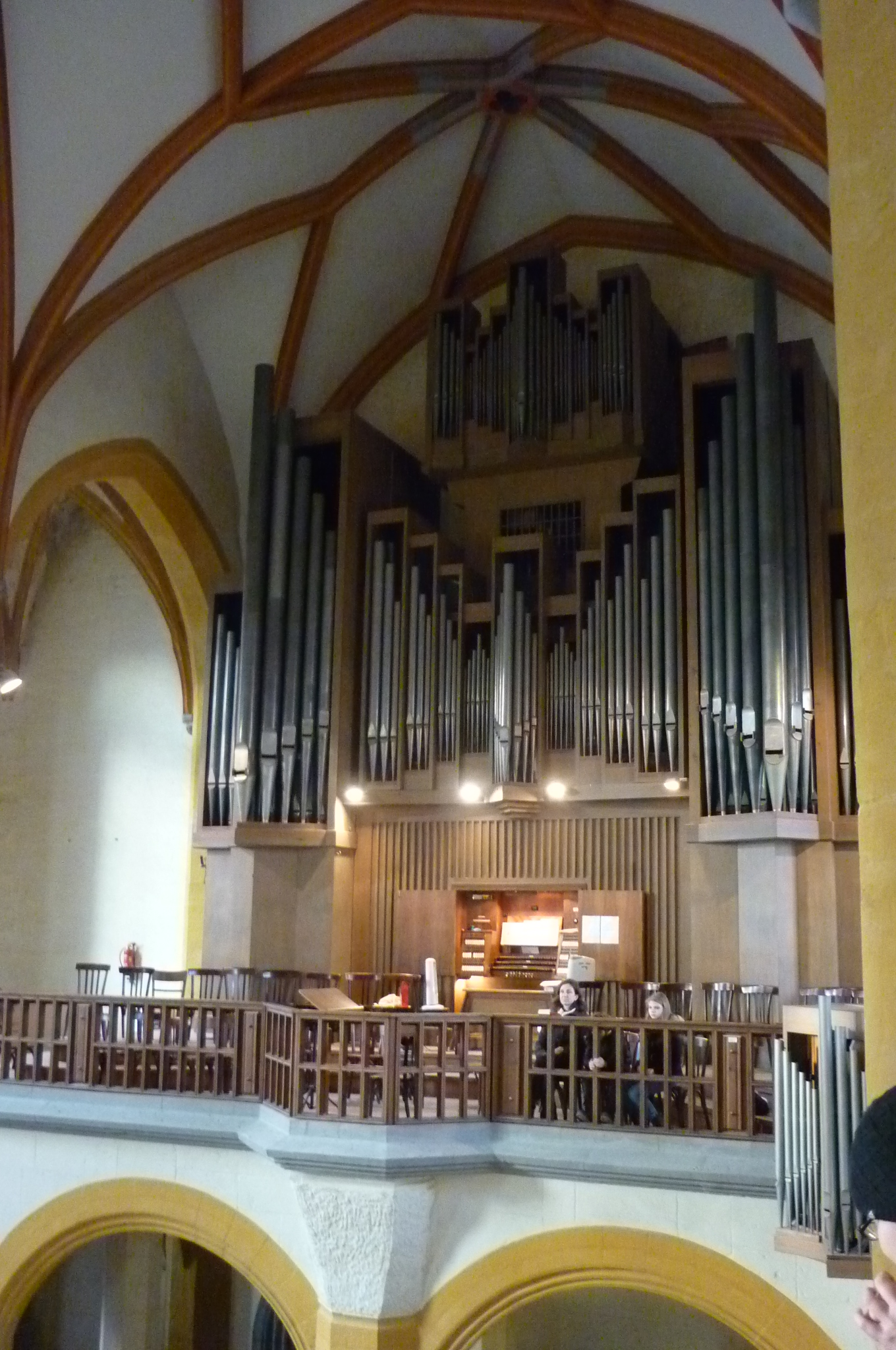 Alexander-Schuke-Orgel der Stadtkirche St. Michael Jena